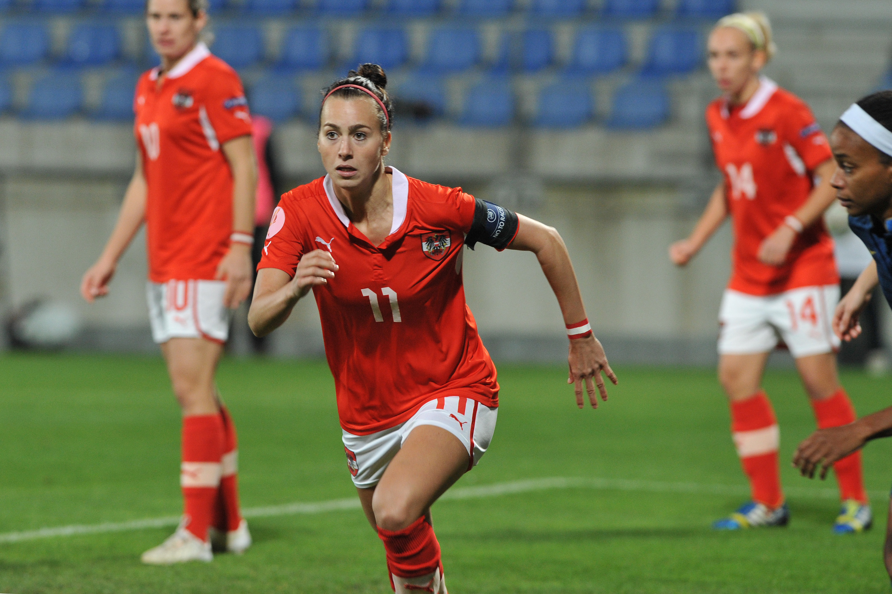 FIFA Women's World Cup 2015 Qualiying Round Österreich - Frankreich am 31. Oktober 2013 in Ritzing: Viktoria Schnaderbeck